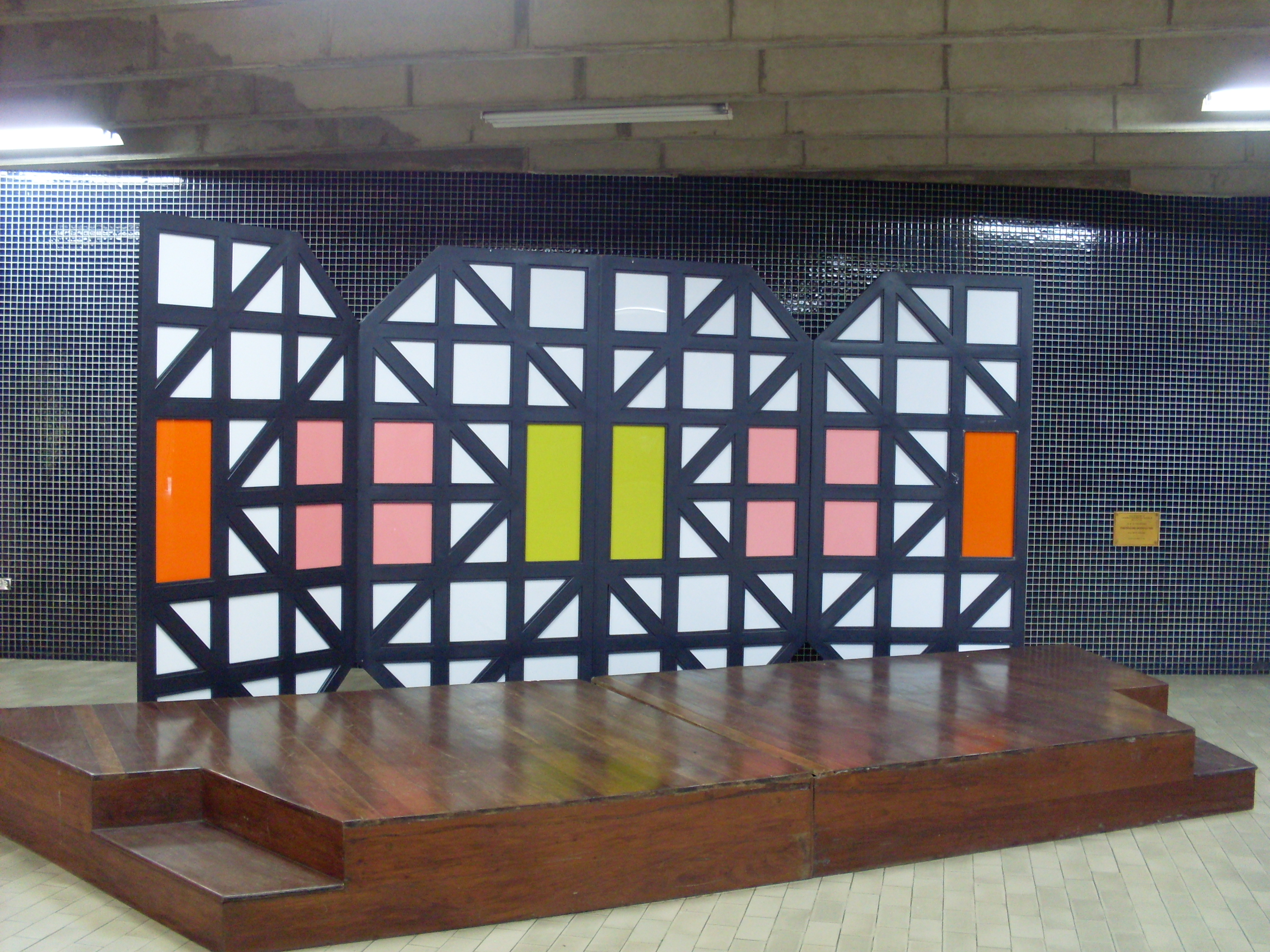 Obra de Mateo Manaure. Título: Construcción cromática 1998 Autor: Mateo Manaure. Año: 1998. Ubicación: Universidad Central de Venezuela. Facultad de Ciencias Económicas y Sociales (FaCES). Entrada principal, hacia la derecha.